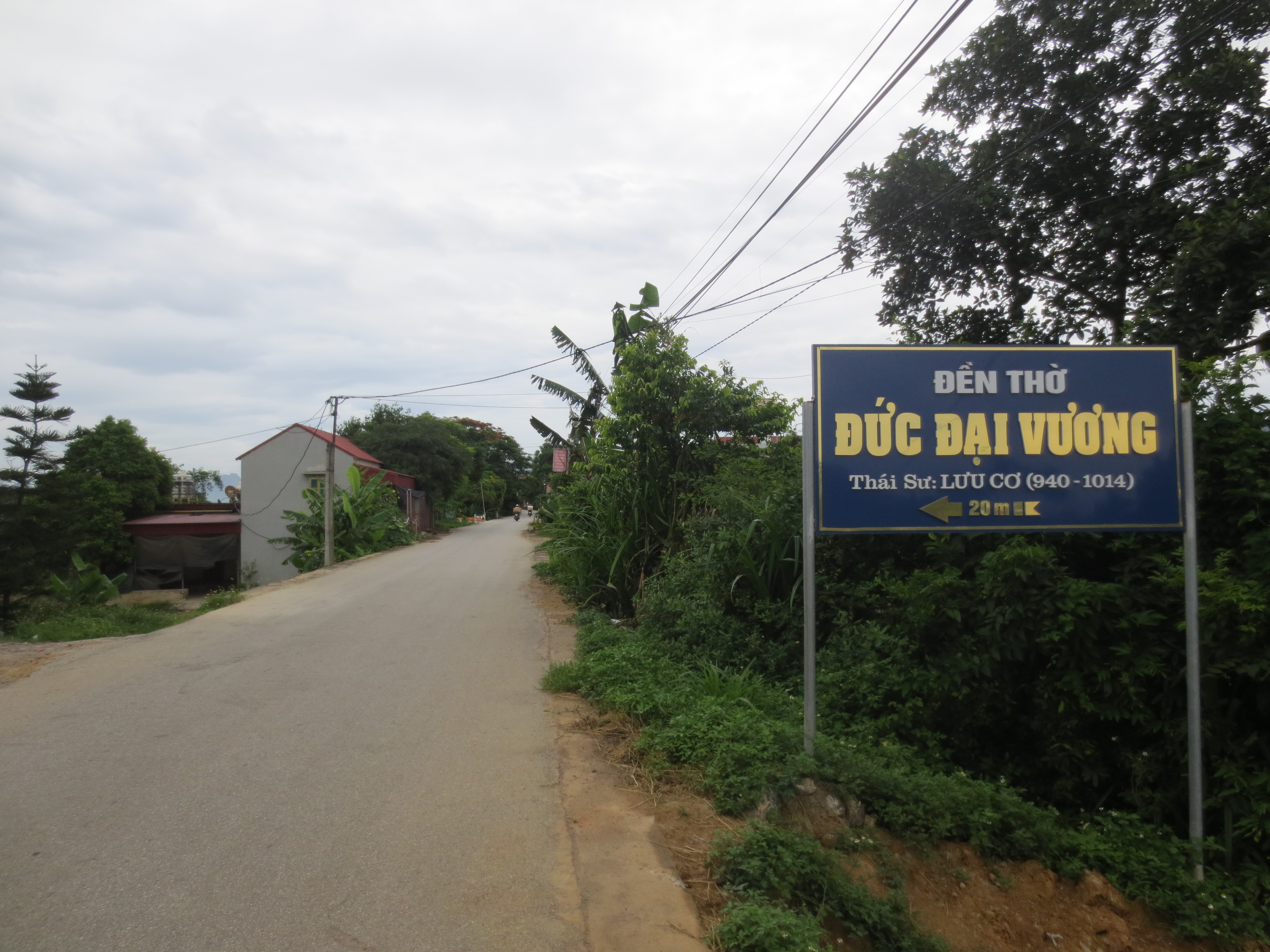 Lối vào Đền Thái Sư Lưu Cơ ở bên sông Bôi